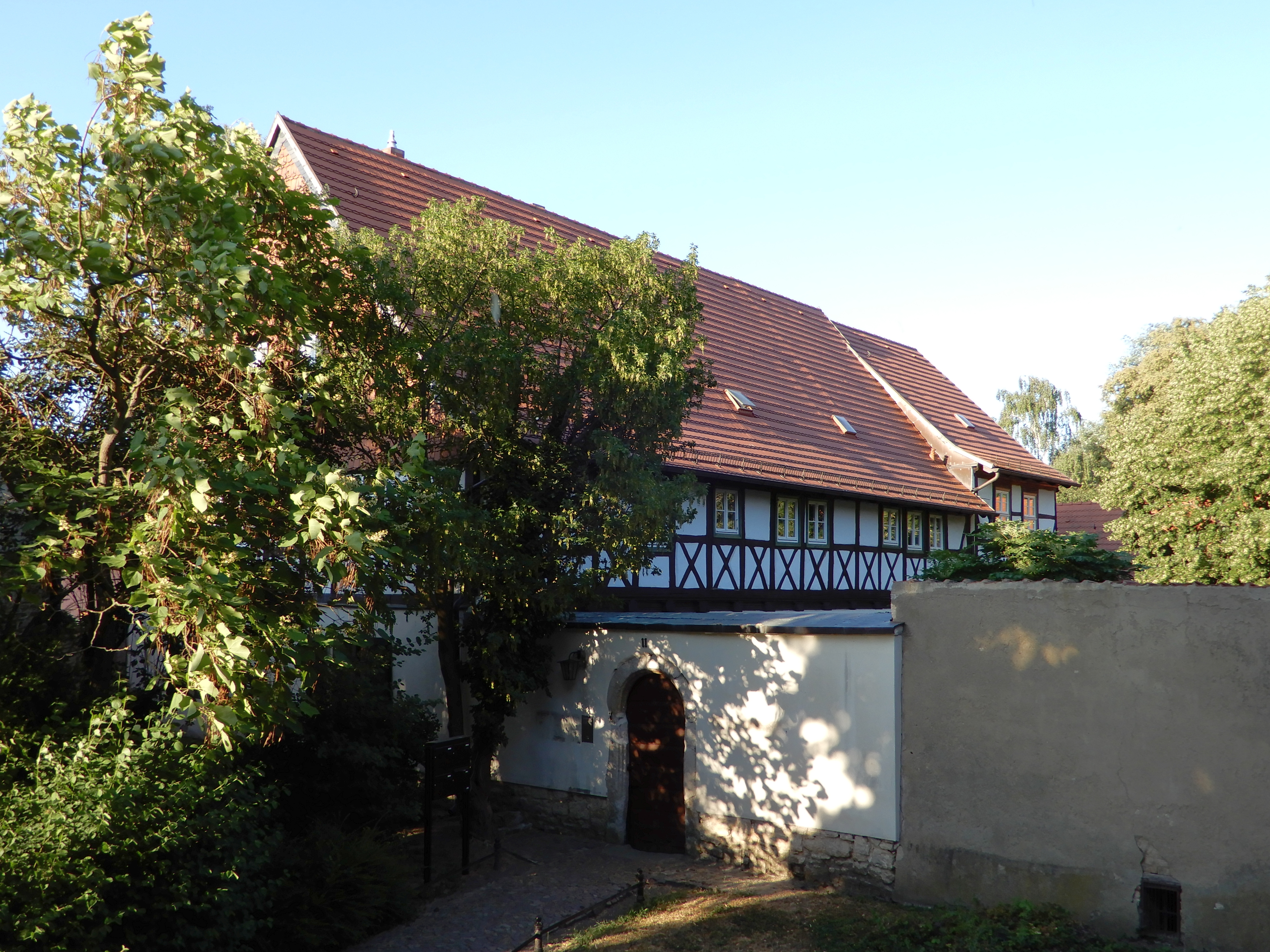 Gatersleben, Schulstraße 11